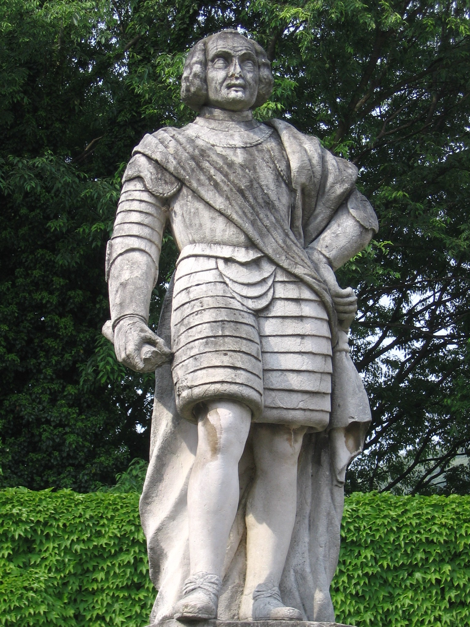 Conte Trussardo Calepio I, Castelli Calepio, Bergamo, Italia